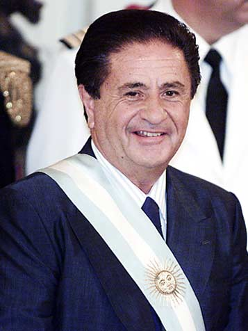 Es una foto del recién electo presidente Eduardo Duhalde, juró como presidente interino, después de la renuncia de De la Rua y otros presidentes.